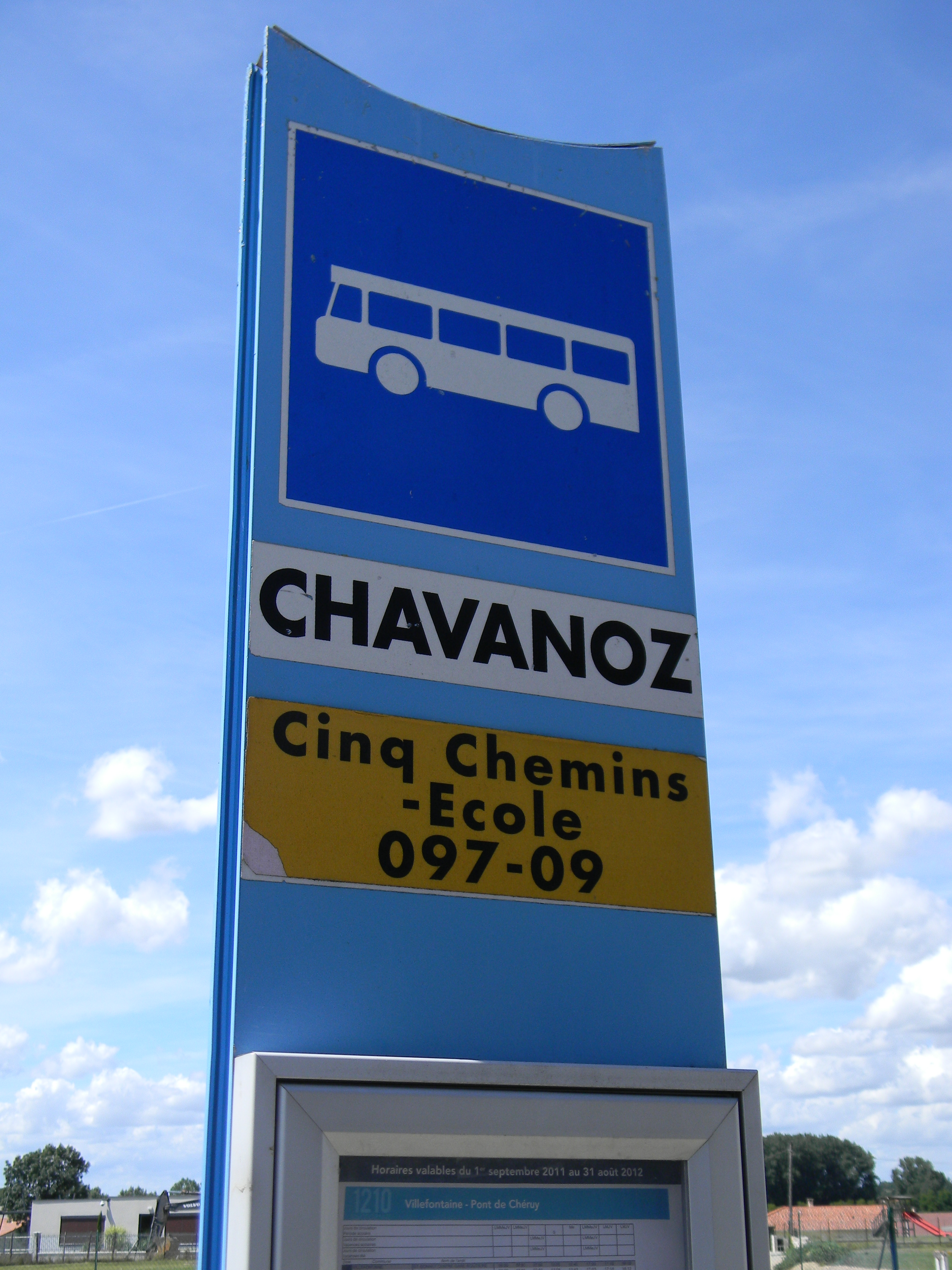 L'arrêt de bus 097-09 (Cinq-Chemin - École) du VFD à Chavanoz.